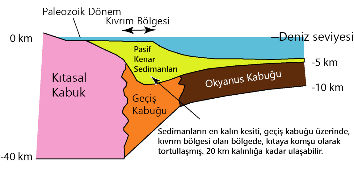 Pasif kıta kenarı